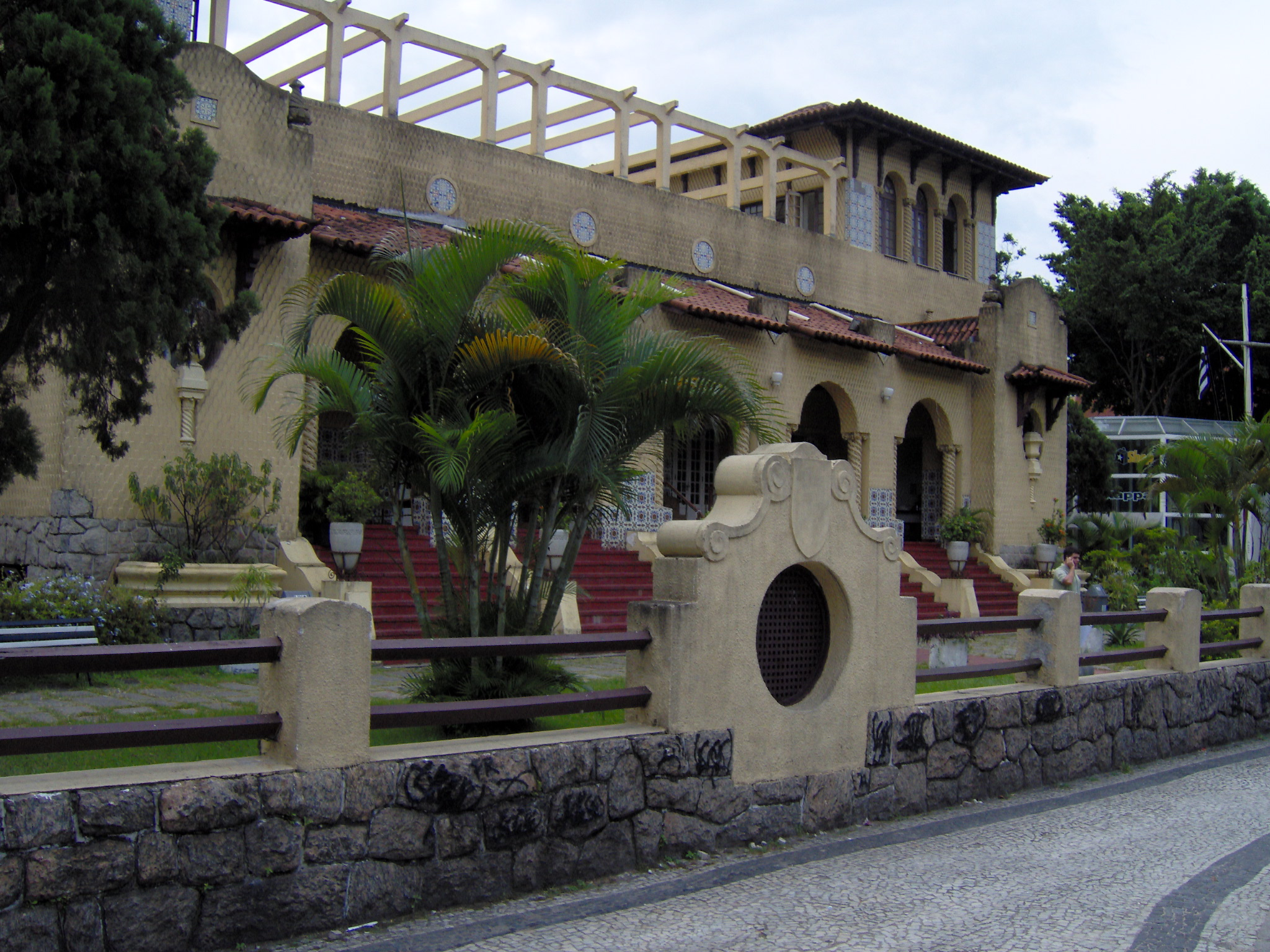 Foto da sede de General Severiano do Botafogo de Futebol e Regatas, no bairro de Botafogo na cidade do Rio de Janeiro (Brasil).